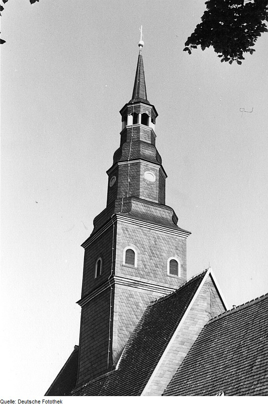 Original image description from the Deutsche FotothekTriebischtal-Taubenheim. Kirchturm